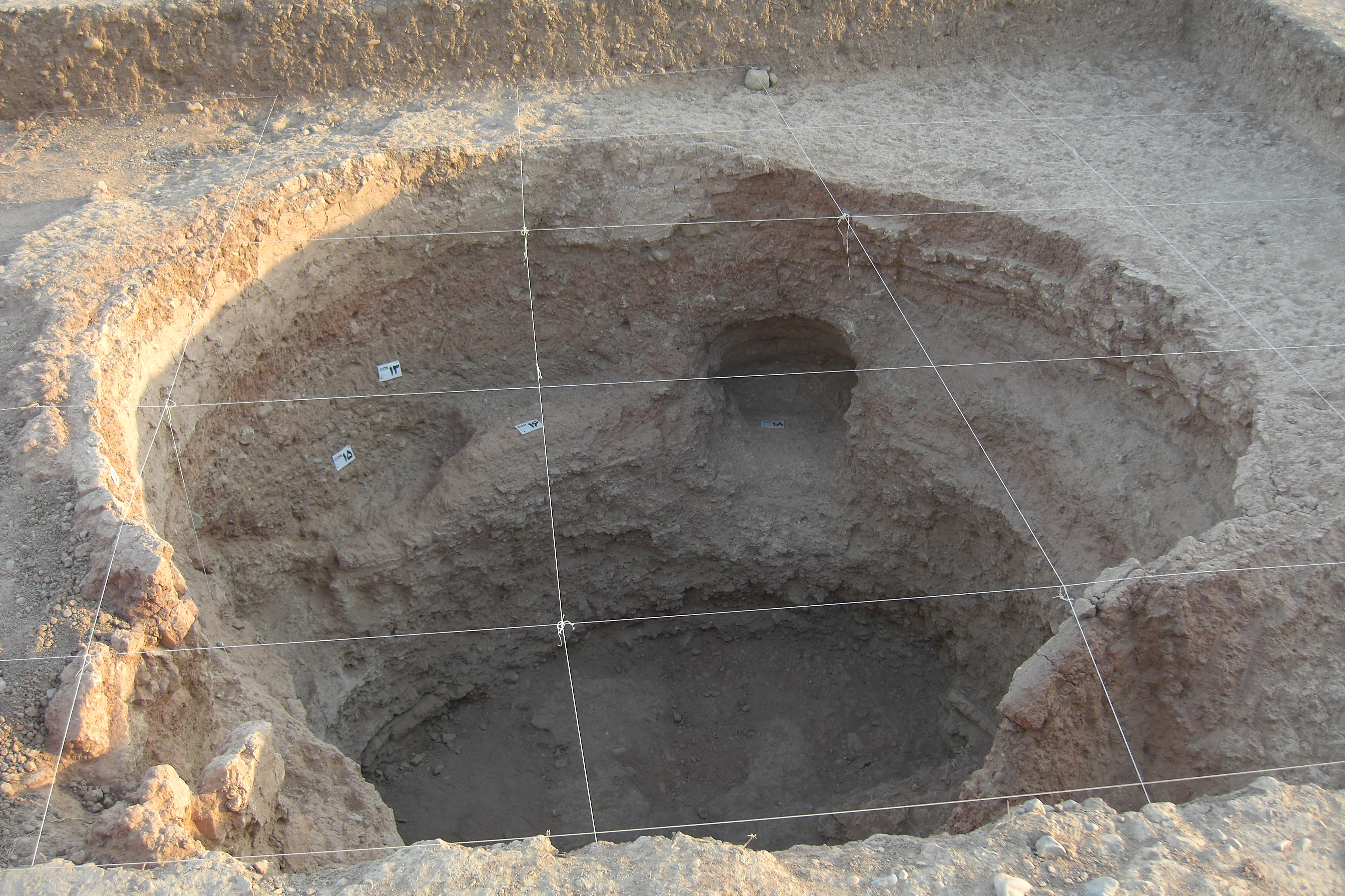 بقایای از یک کوره سفالگری که طی کاوش های باستان شناختی در شهر تاریخی بلقیس در سال 1387 توسط باستان شناسان کشف گردید.